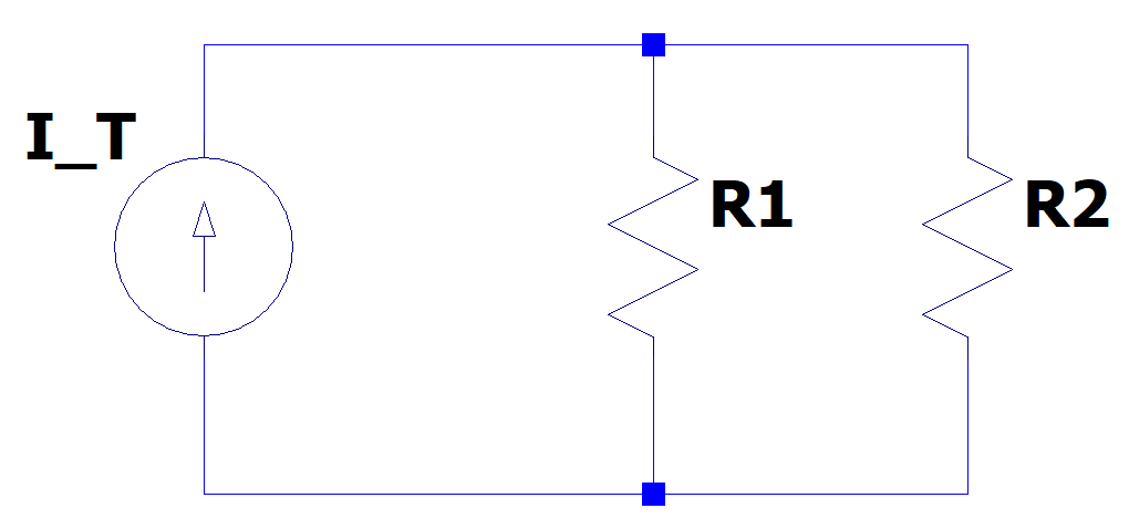 מעגל חשמלי עם שני נגדים מחוברים במקביל למקור זרם